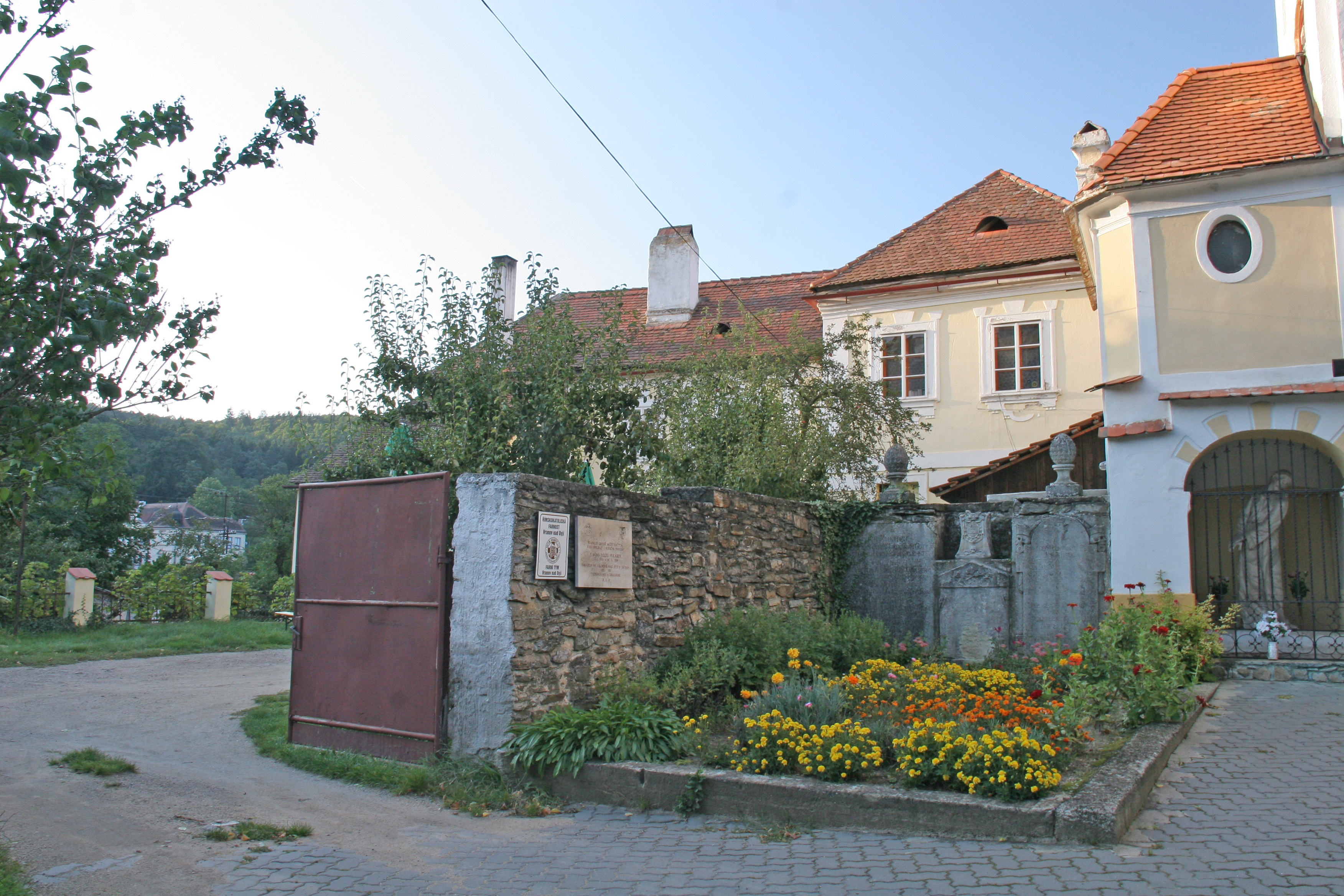 Kostel Nanebevzetí Panny Marie, Vranov nad Dyjí.